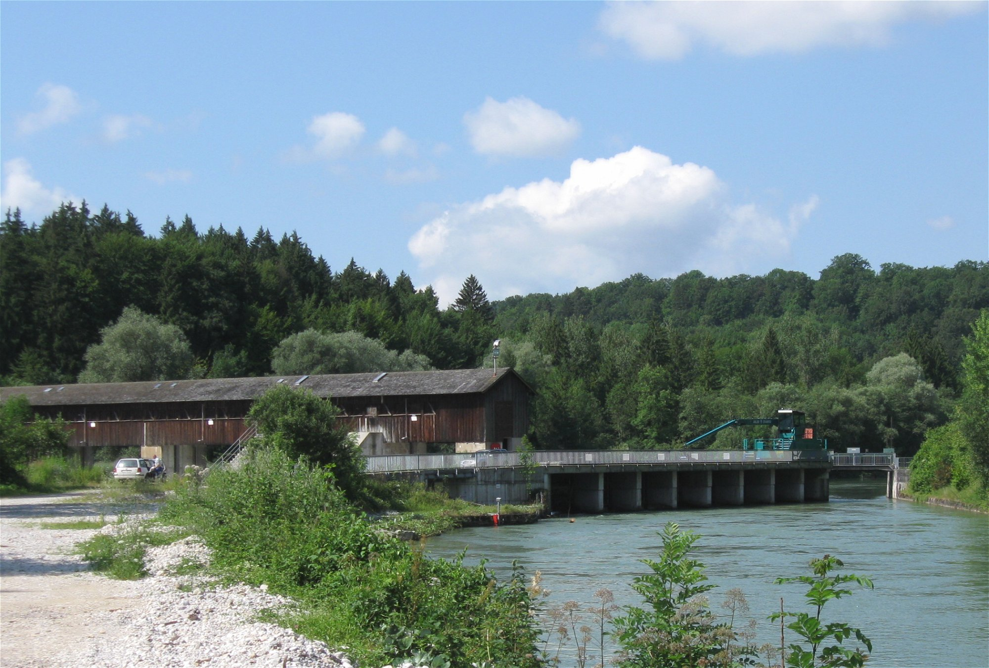 Isarwehr am Wasserkraftwerk Höllriegelskreuth, Ausleitung des Isar-Werkkanals, Blickrichtung flussaufwärts